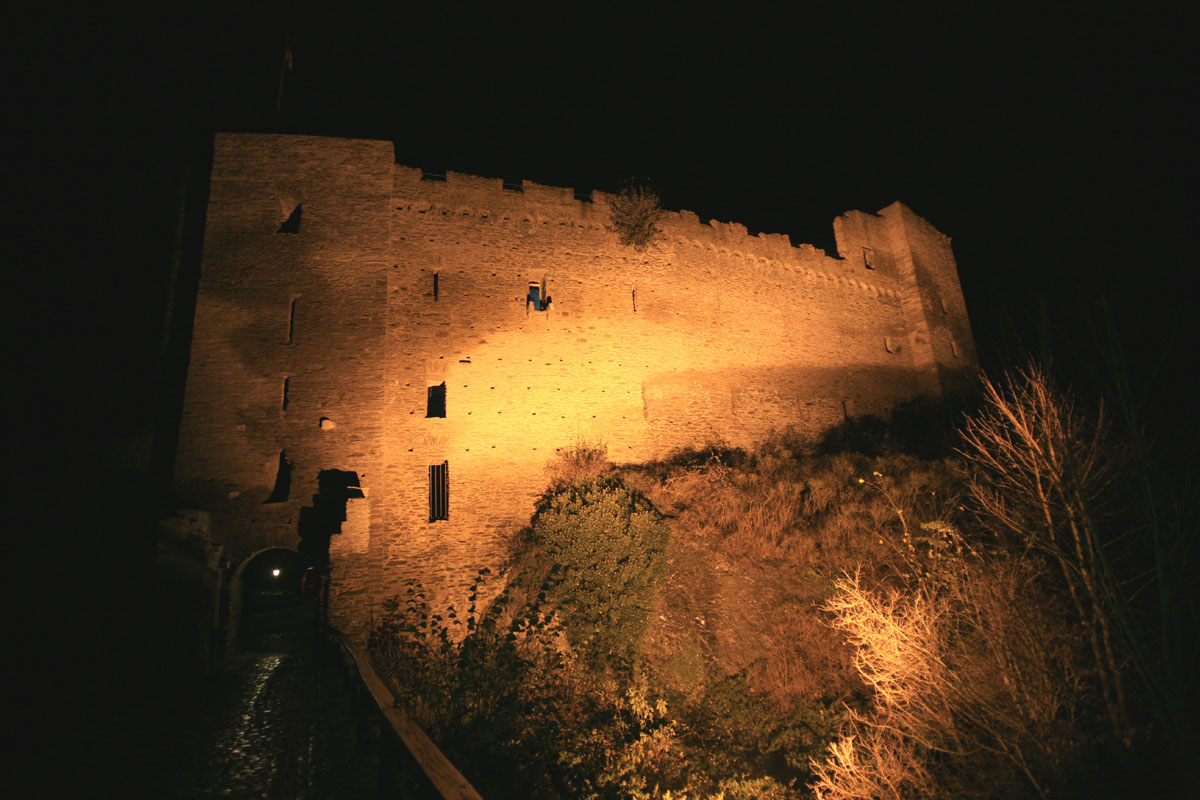 Burg Hohenstein im Taunus